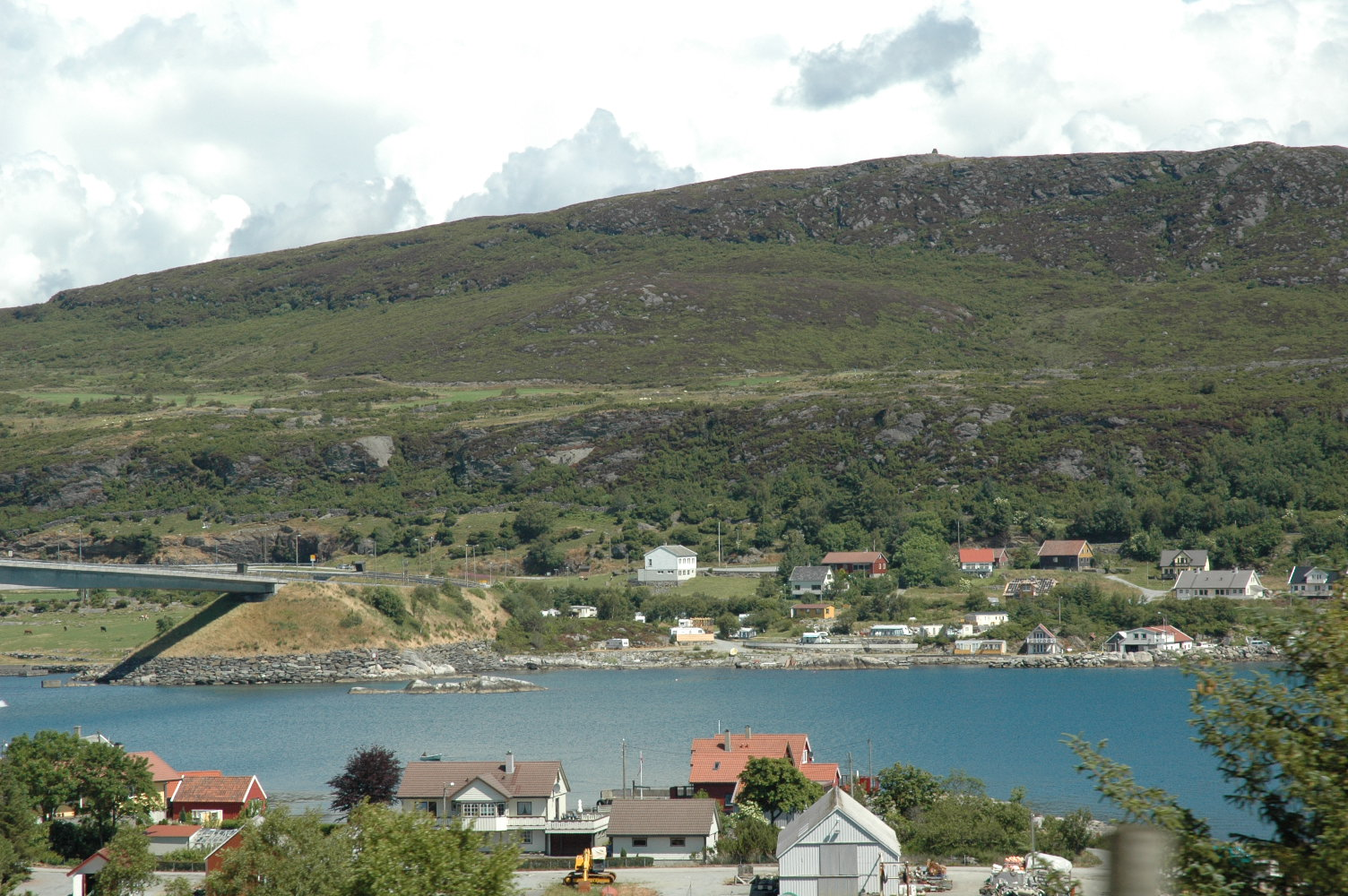 Fra Bokn mot Austre Bokn og campingplassen